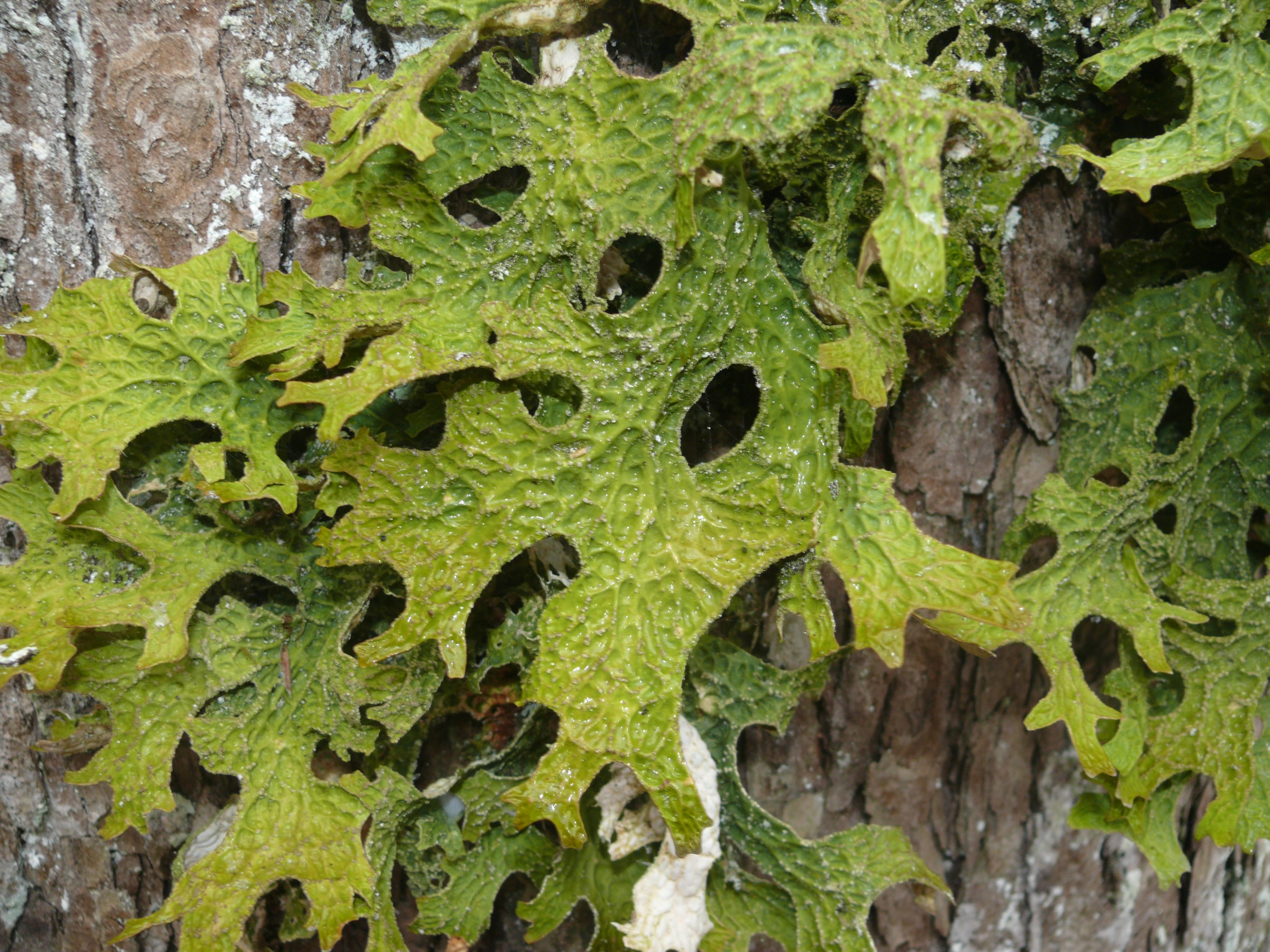 Lobaria pulmonaria, Schwäbisch-Fränkische Waldberge, Germany